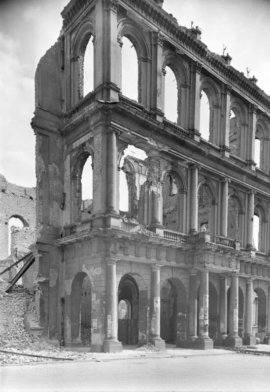 Potsdam.- Stadtschloß nach 1945 Information added by Wikimedia users.Das Bild zeigt nicht das Stadtschloss, sondern den Mittelbau des Palasts Barberini.